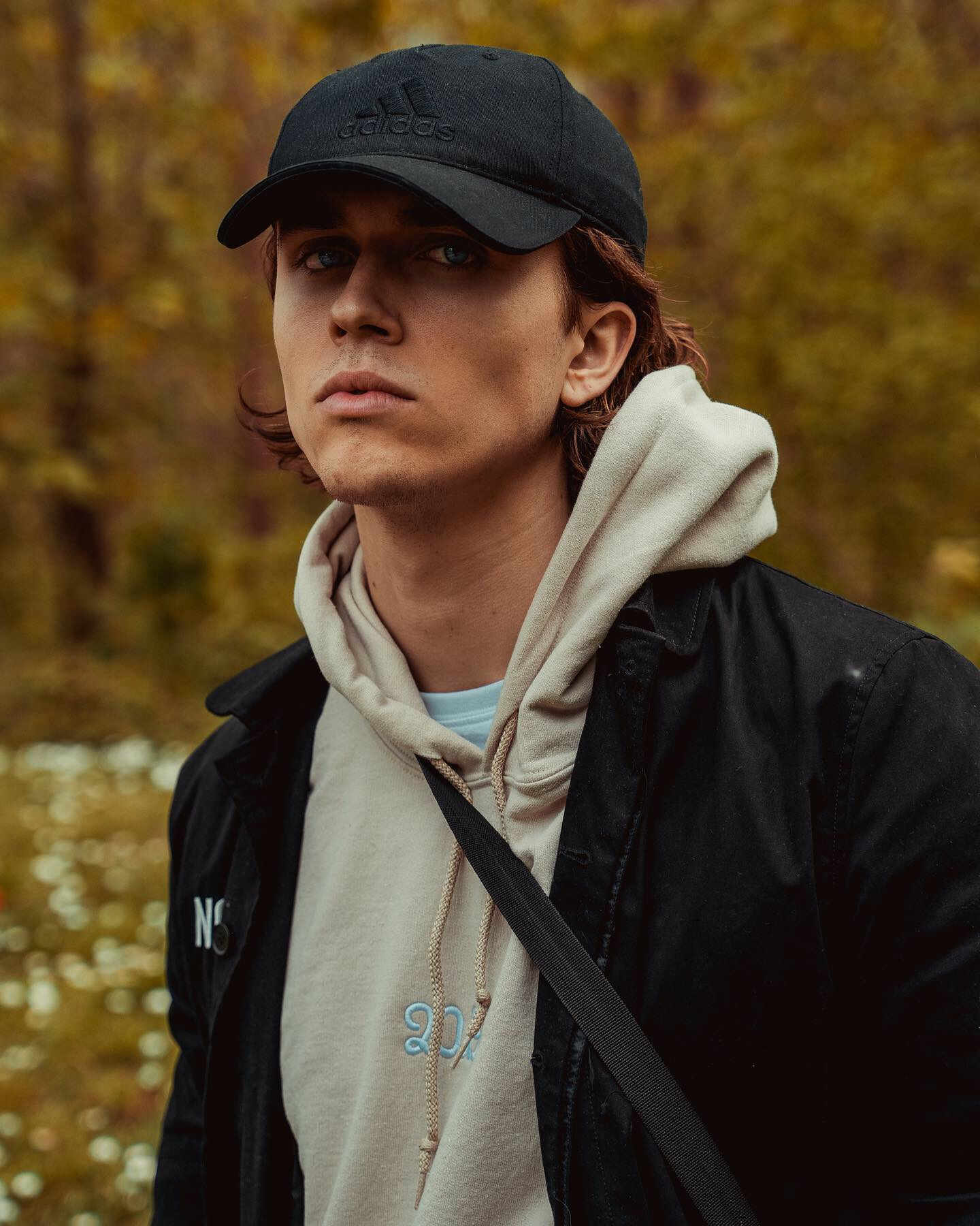 Ian Thomas in Ghent (Belgium) 2019